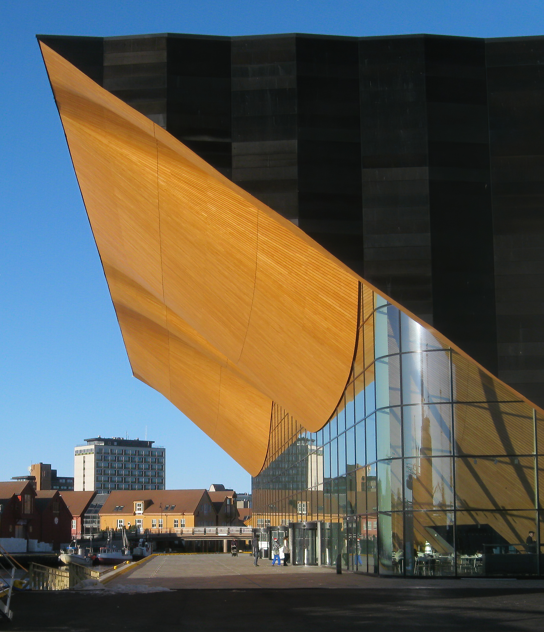 Kilden teater- og konserthus, Kristiansand, sett sørfraUnknown